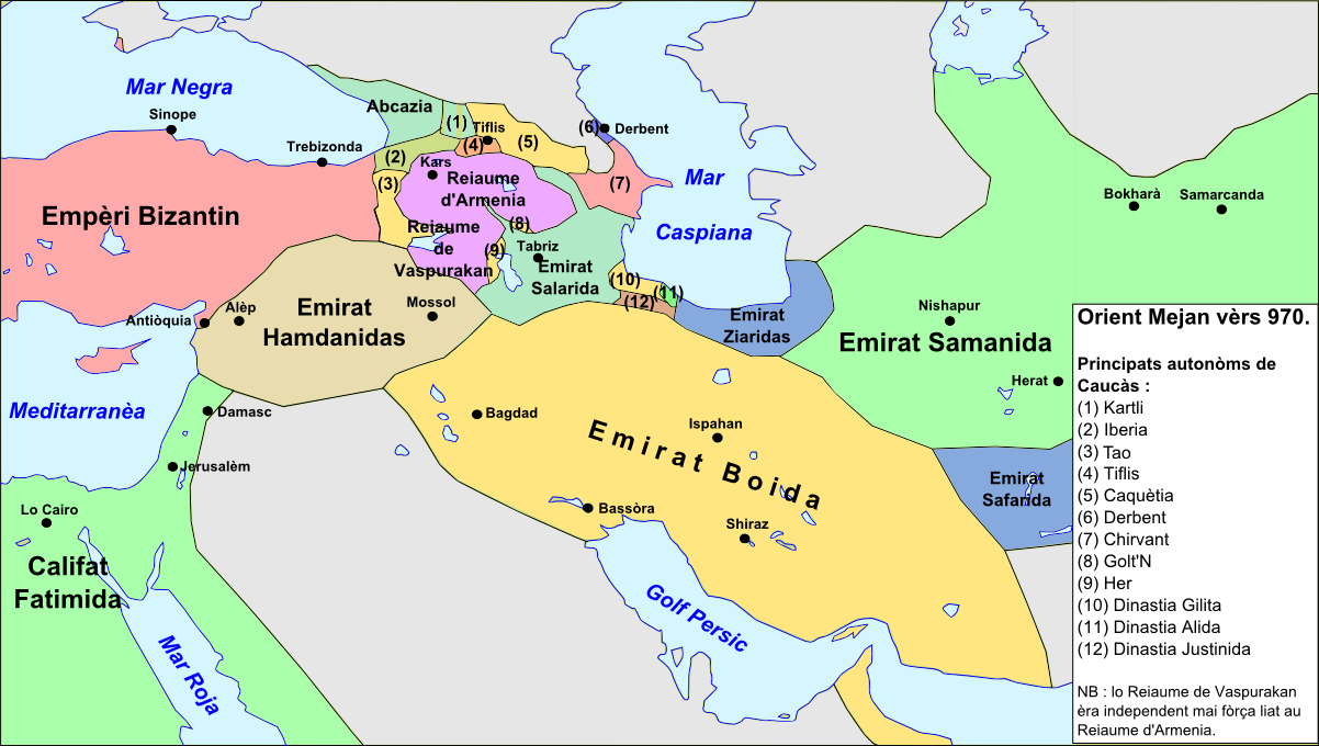 Orient Mejan vèrs 970.